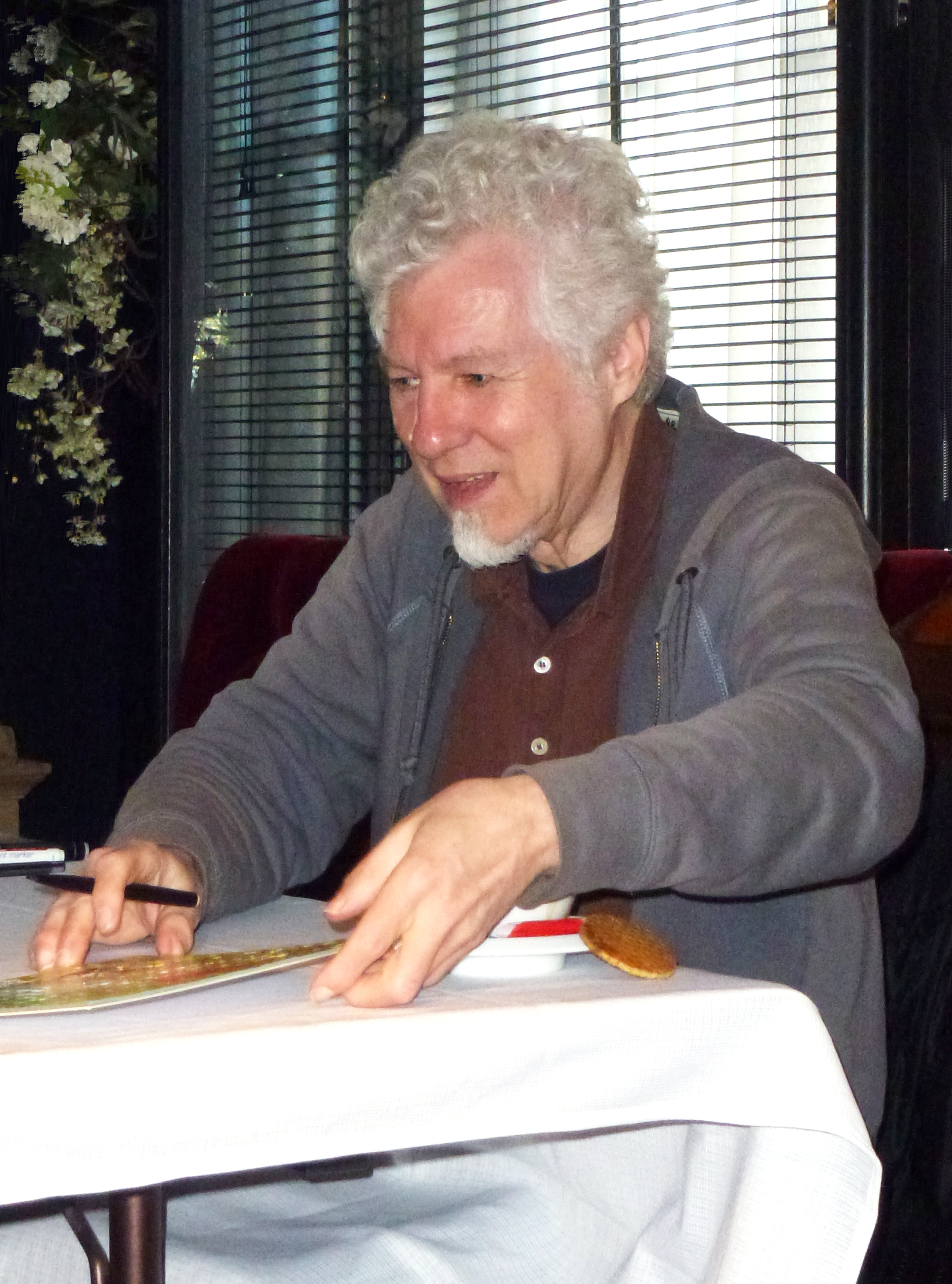 Stripkunstenaar Robert van der Kroft tijdens het 10e evenement Strips op de Markt in Gouda. Van der Kroft is tekenaar van Sjors en Sjimmie en Claire